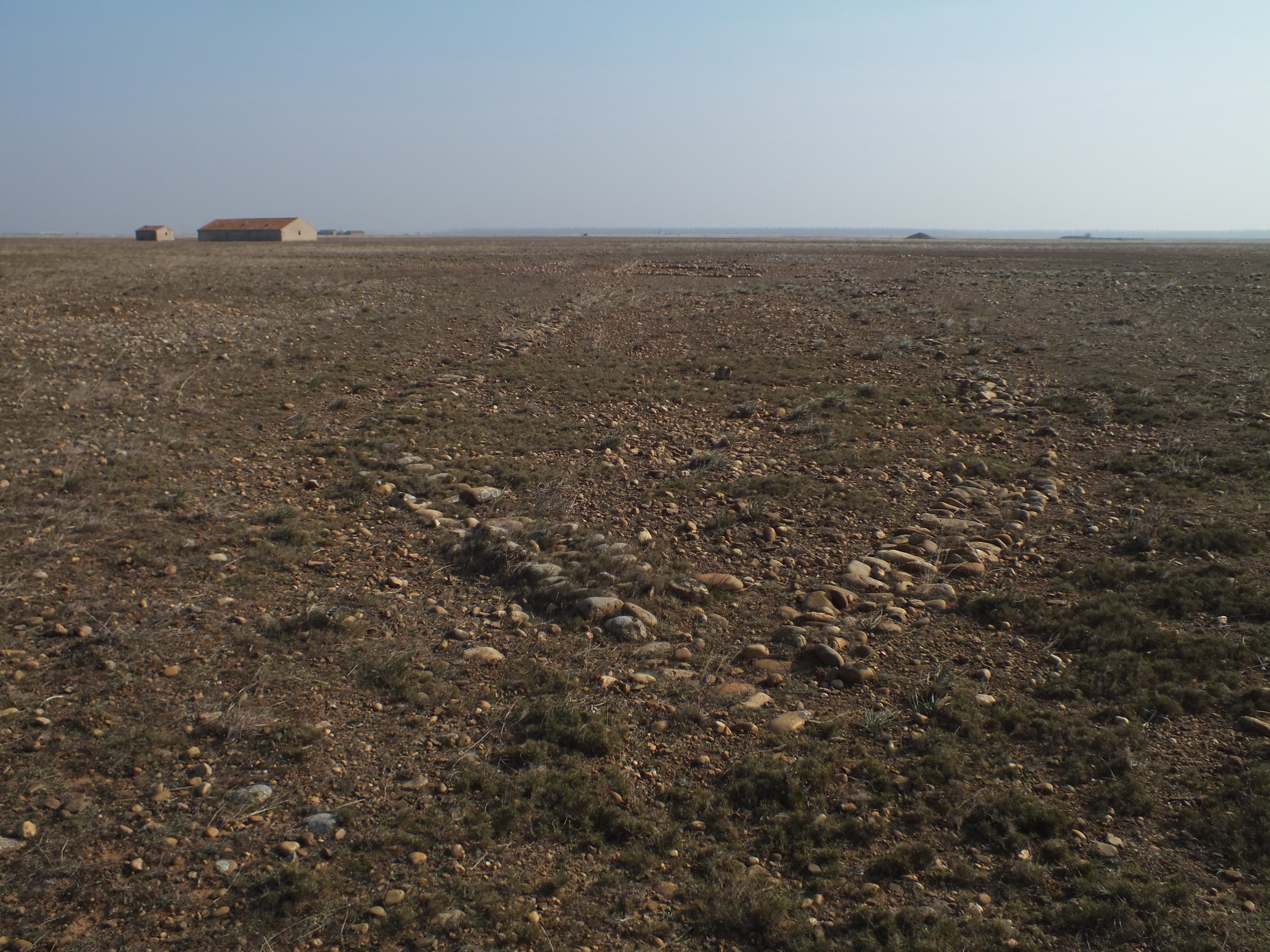 Bergerie romaine du Petit-Abondoux, 54 m x 10 m, 2ème siècle, Plaine de la Crau (France).